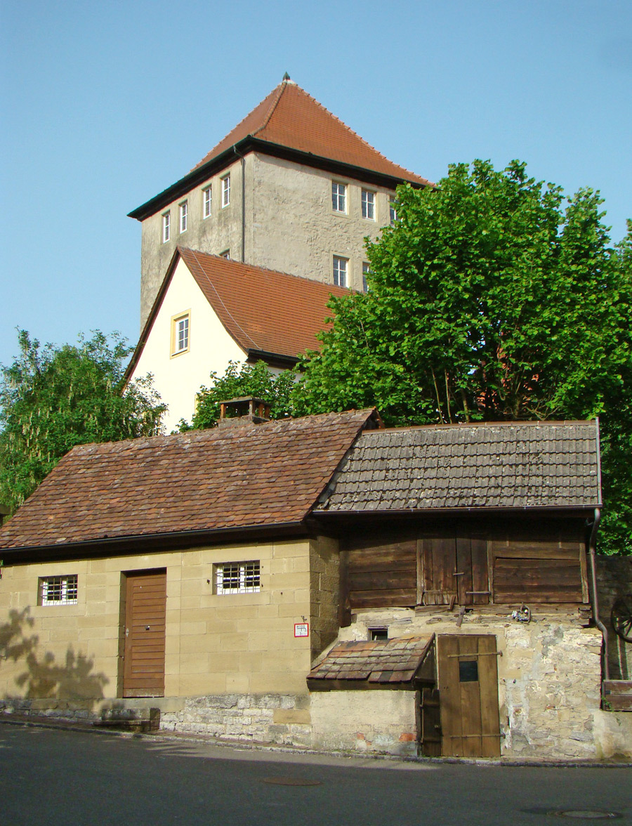 Szene beim Schloss in Forchtenberg-Sindringen